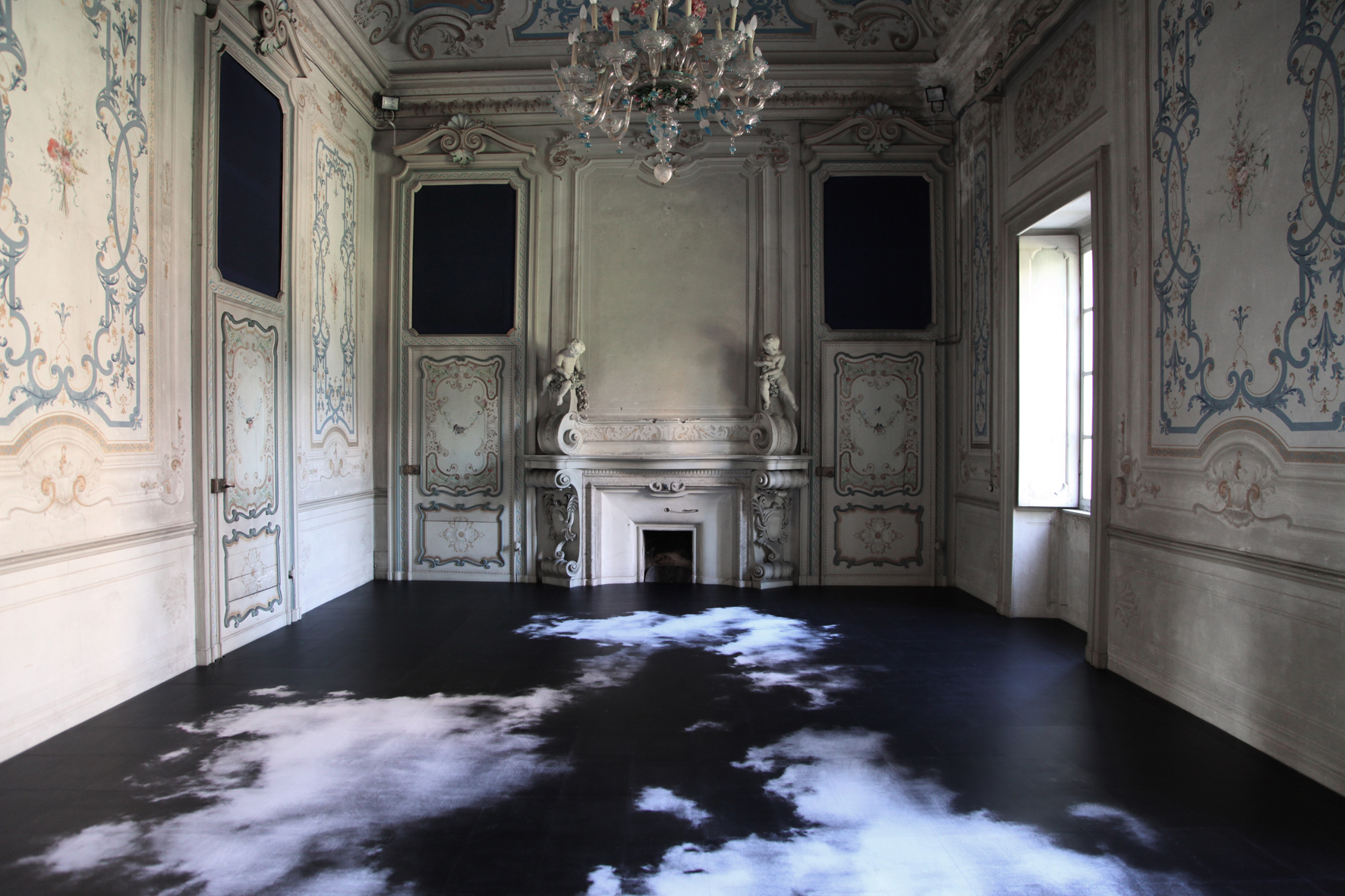 Stanza del Cielo, Elvio Chiricozzi, Castello di Rivara, 2015